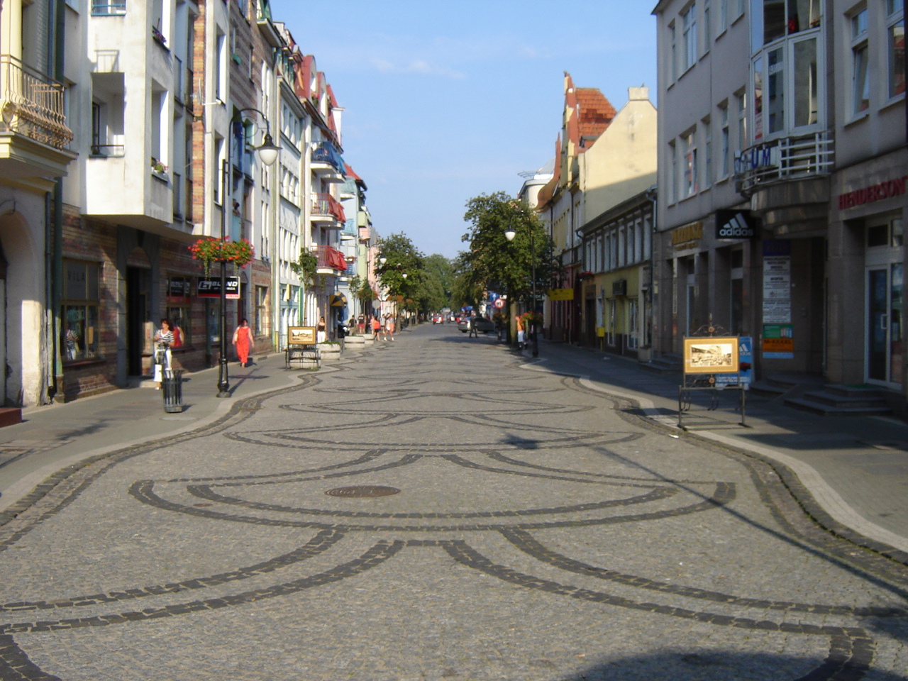 Deptak w Świnoujściu